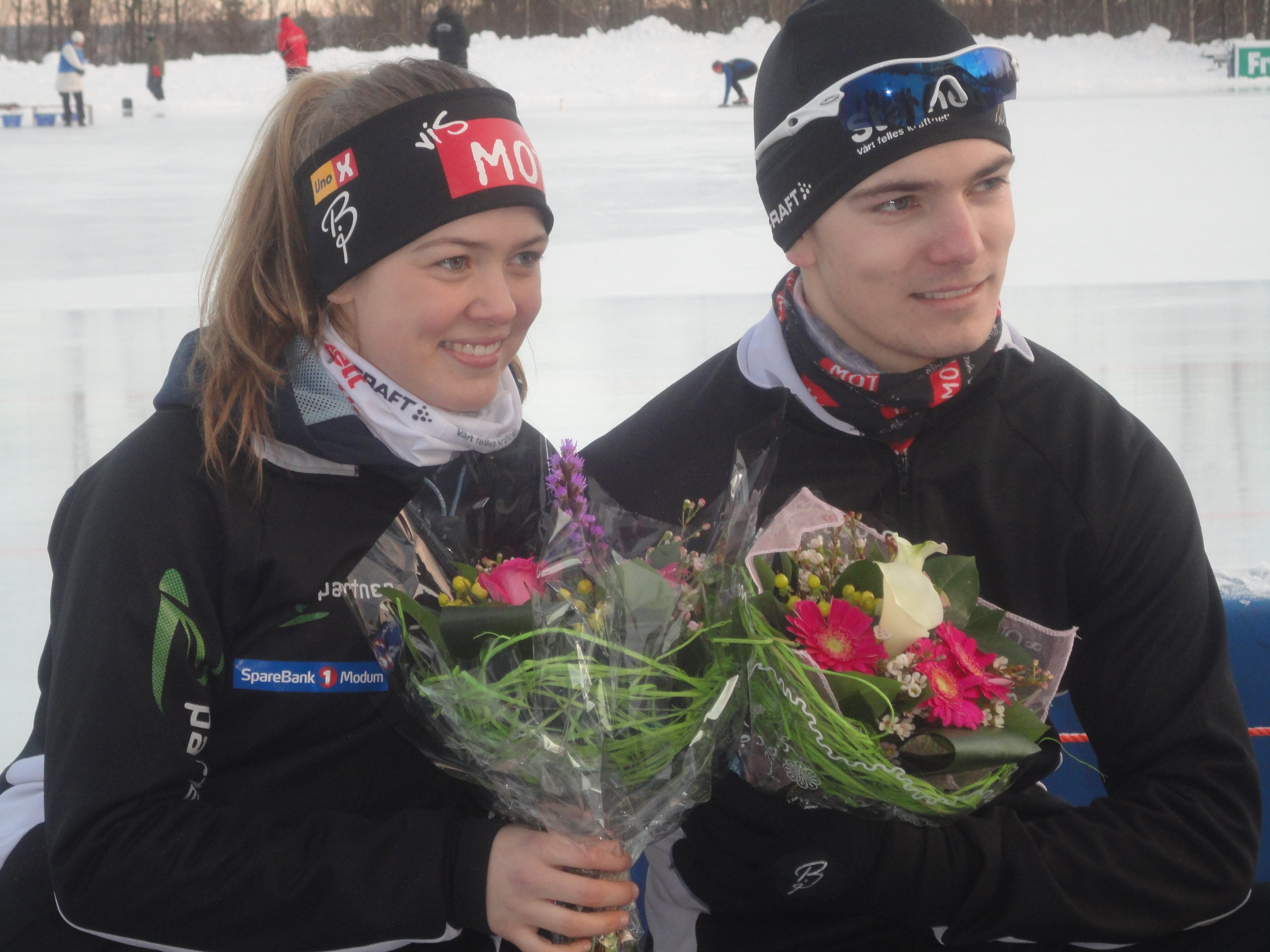 Søskenparet Bjertnes, Ellen og Martin med hver sin blomsterbukett etter blomsterseremoni under Sprint-NM for junior 2012 i Asker